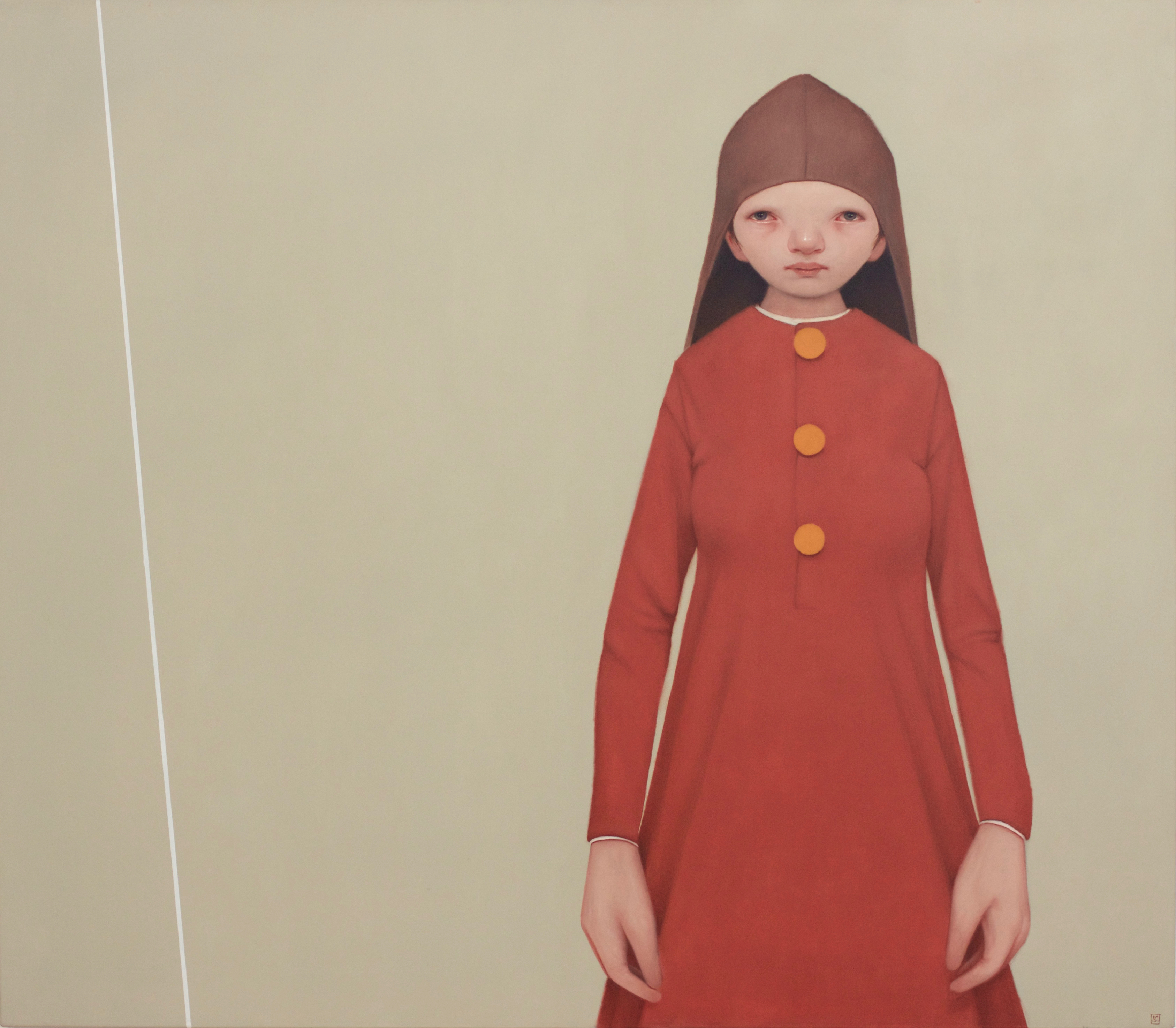 Mattias Sammekull, "Den starkaste". 2016. Olja på duk 105 x 120 cm. Foto: Ida Gudmundsson